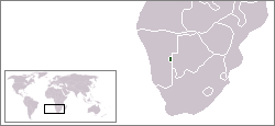 Description:Carte de localisation du bantoustan du Tswanaland, Namibie Auteur:Rémih